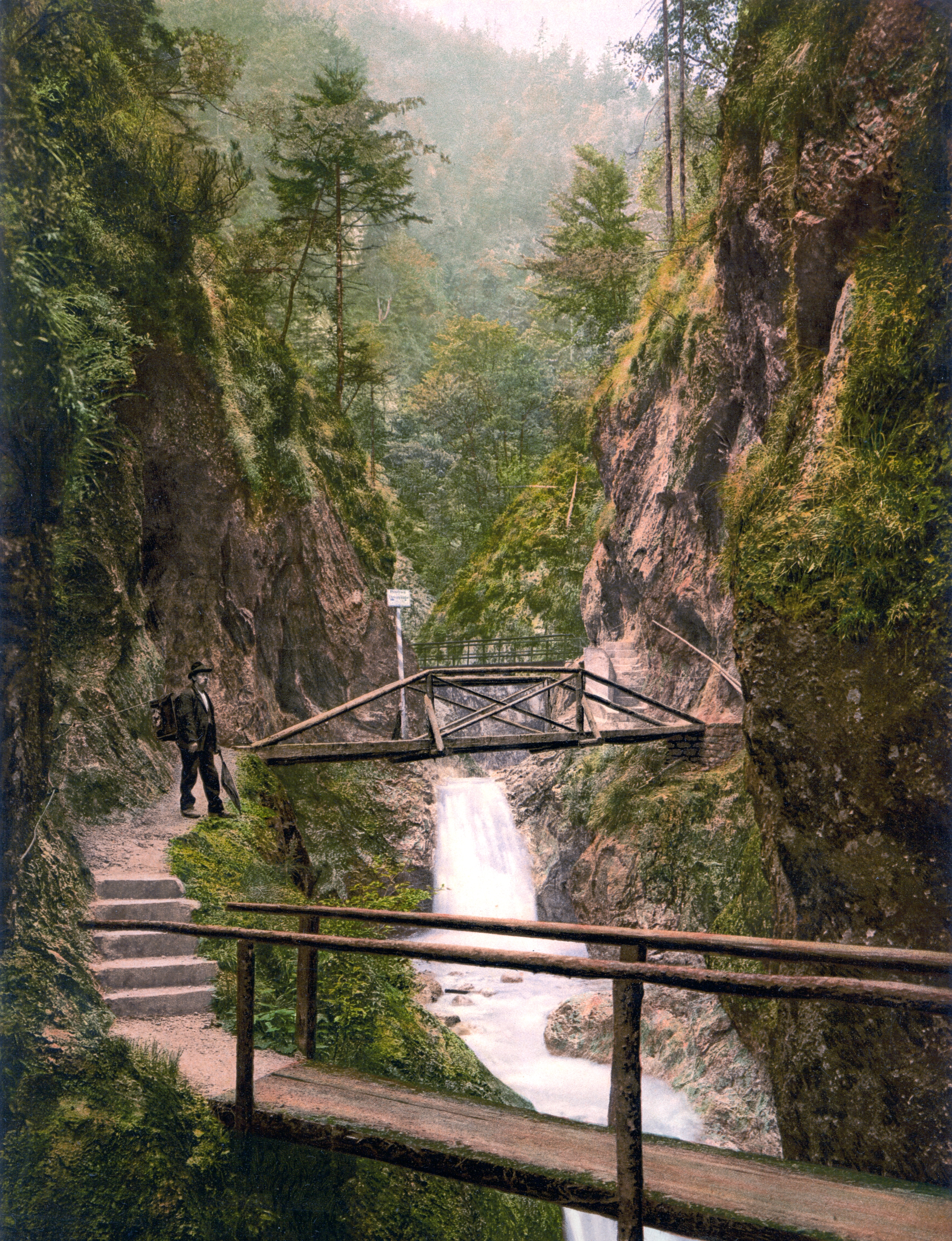 Berchtesgaden Almbachklamm um 1900